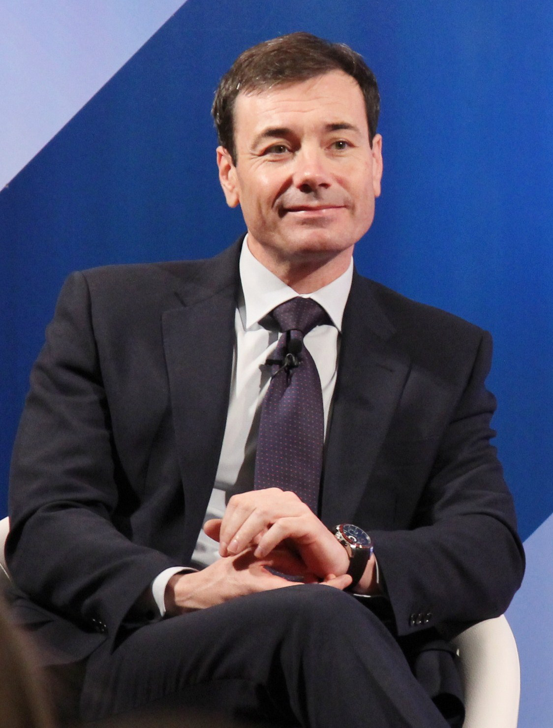 Tomás Gómez, político español del PSOE.